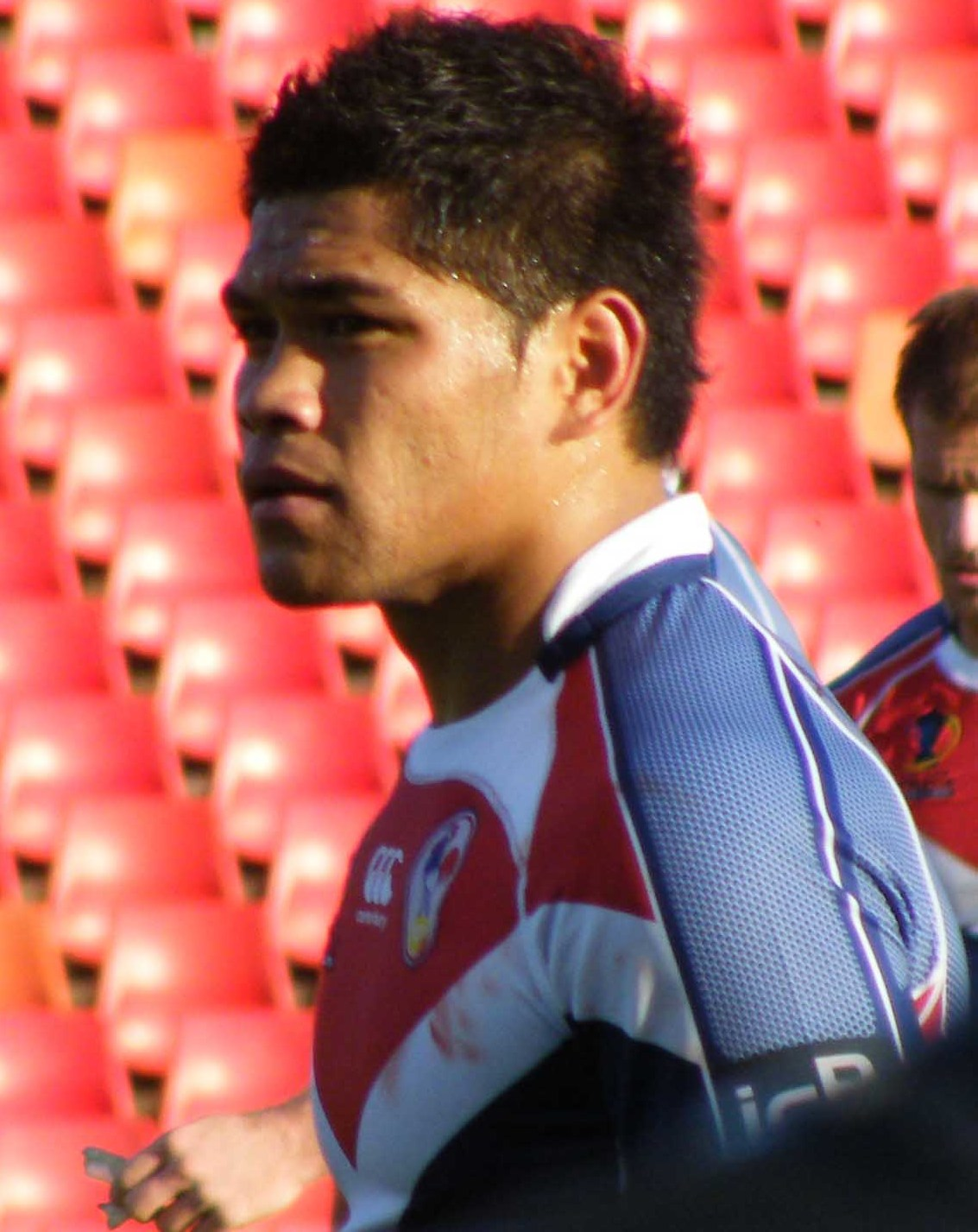 Dimitri Pelo, joueur de rugby à XIII français sous le maillot de l'équipe de France